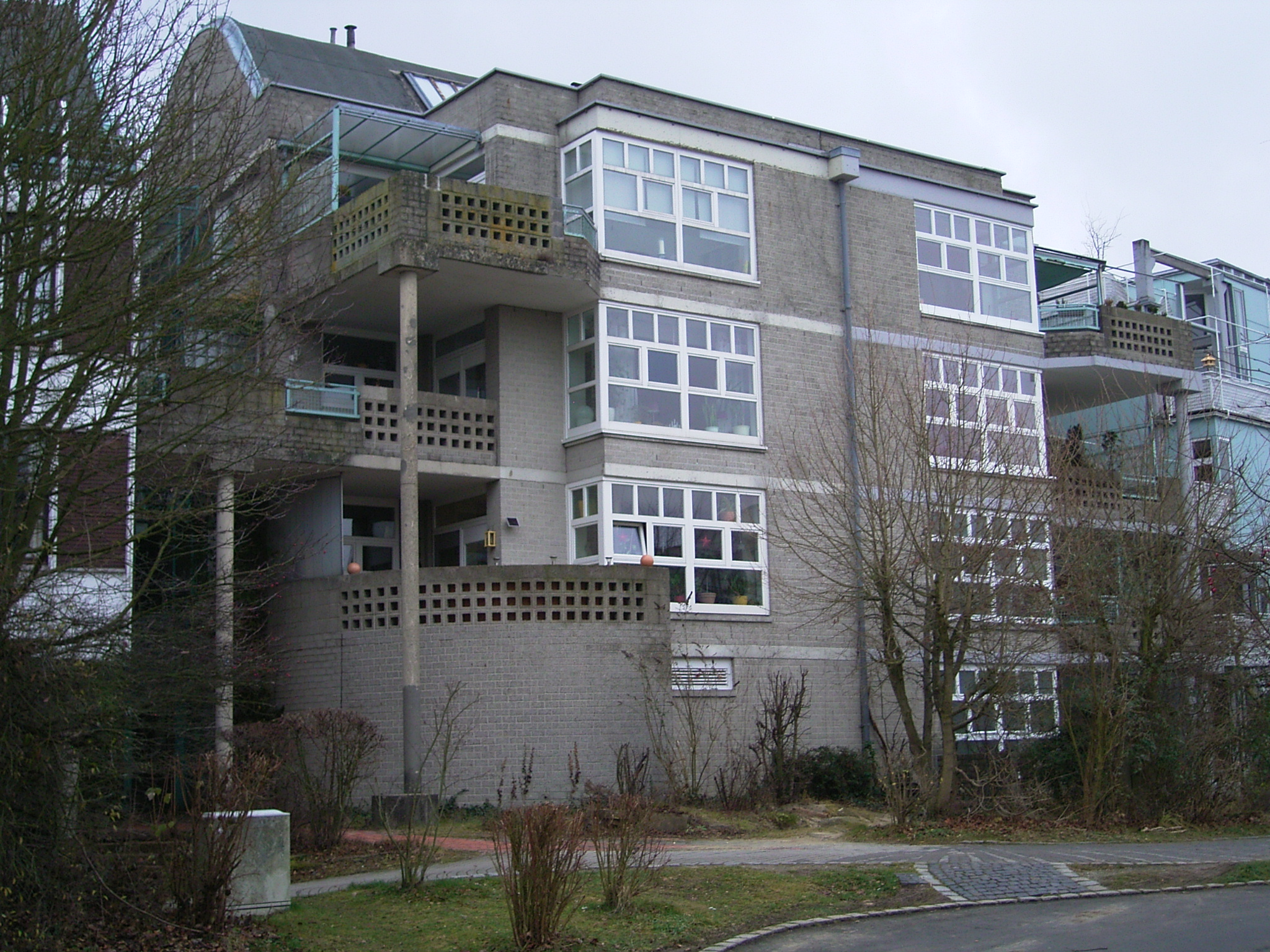 documenta urbana Wohngebäude in Kassel 1979-1982. Teil der „Wohnschlange“ Herman Hertzberger